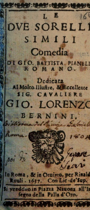 Frontespizio dell'edizione a stampa della commedia "Le due sorelle simili" (1637) di Giovanni Battista Pianelli